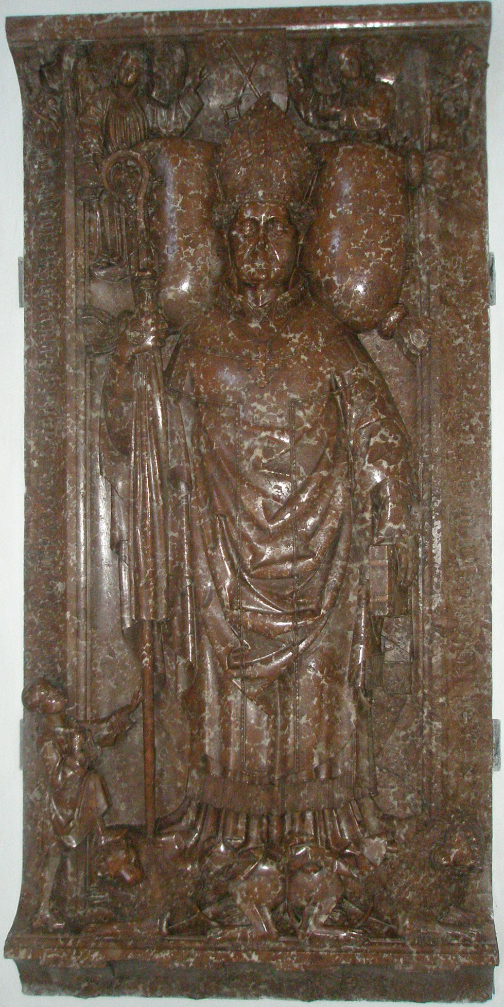 Grabdenkmal Propst Ulrich Pernauer († 1495, Stiftskirche Berchtesgaden))